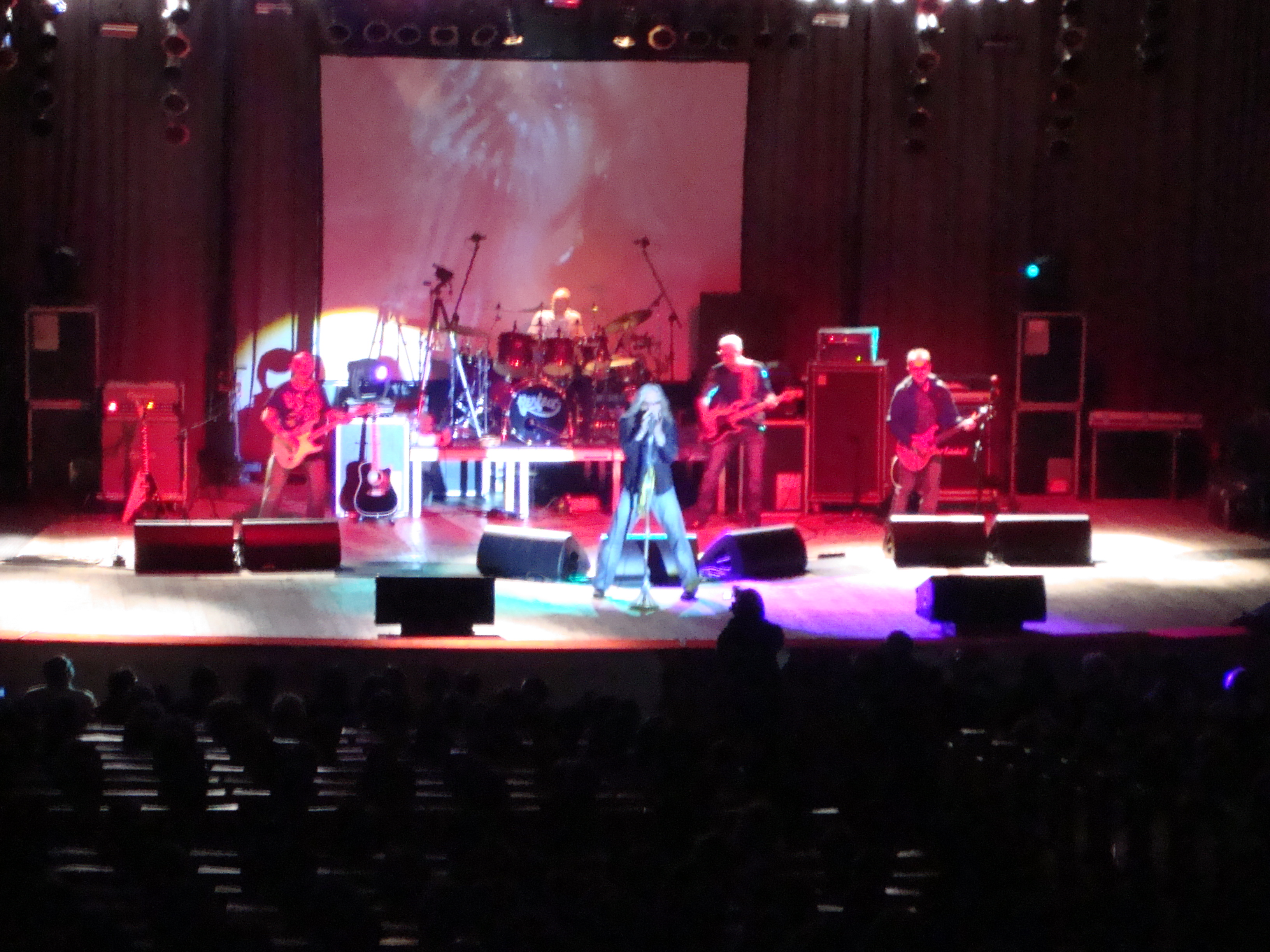 Zespół Perfect podczas koncertu w Sali Kongresowej (8 maja 2010)